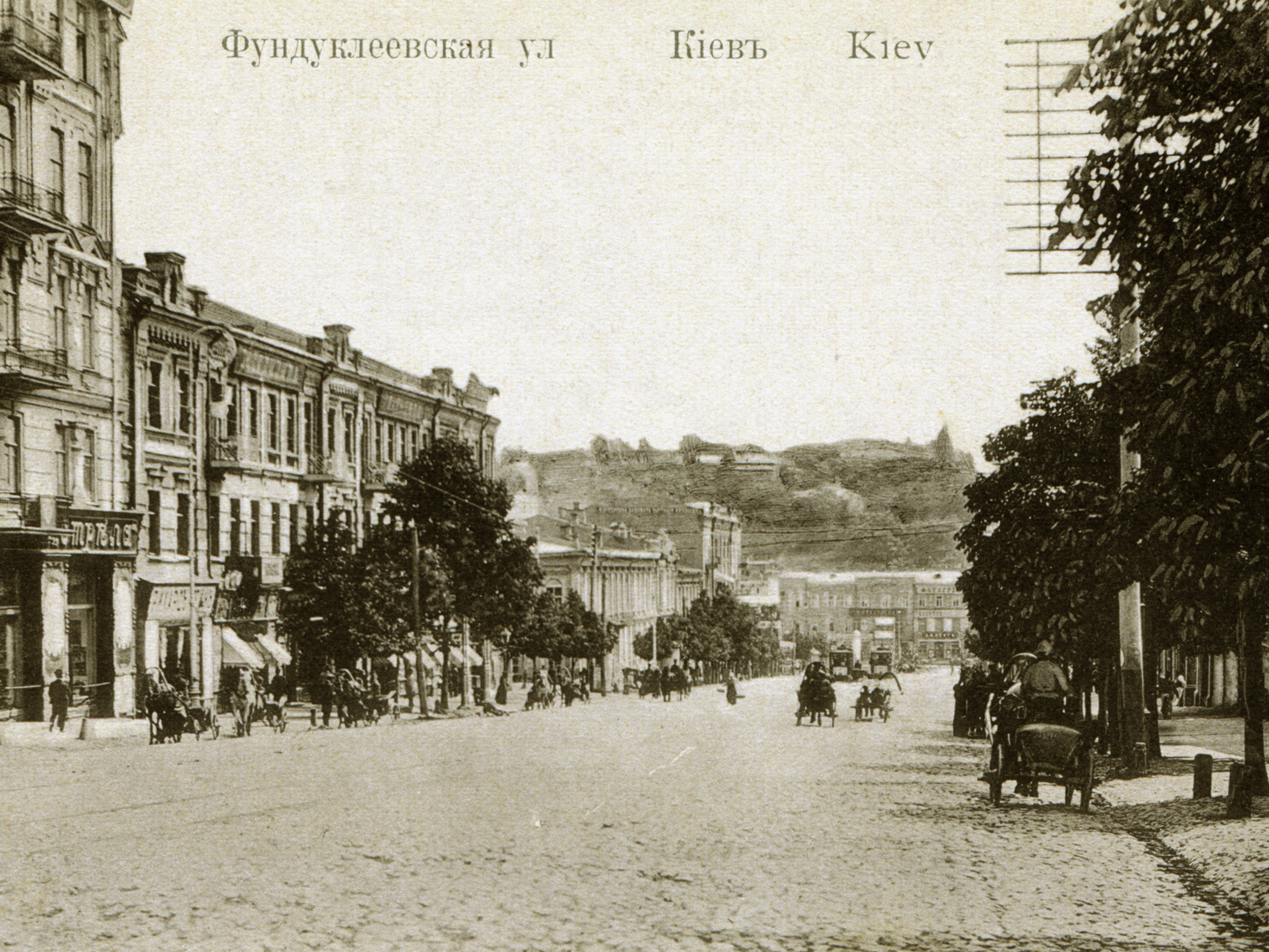 Вулиця Фундуклеївська (Богдана Хмельницького). Київ, початок ХХ ст.